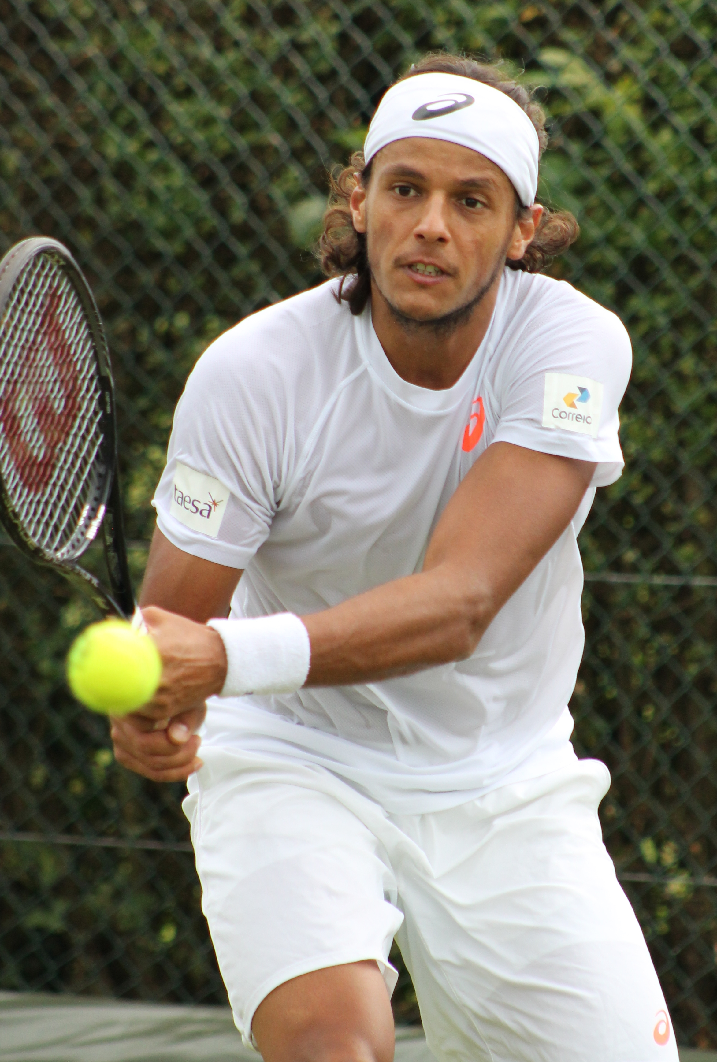 Souza WMQ14 (3)